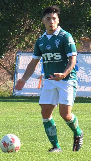 Fotografía de Kevin Seguel, jugador de fútbol profesional, perteneciente al Santiago Wanderers de Chile